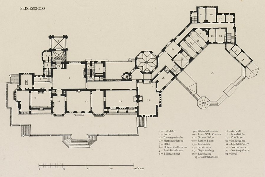 Schloss Friedrichshof in Kronberg/Hessen,, Gesamtgrundriss Erdgeschoss 1895 Grundriss vom Erdgeschoss des Gesamtbauwerkes; errichtet 1889/93 als asymmetrische, langgestreckte Mehrfügelanlage nach dem Struktur-Prinzip "Englischer Herrensitze", d.h. klare Unterteilung in Herrschafts- und in Wirtschaftsflügel; ungewöhnlich weite und sehr seltene Flügelspreizung von 135°; mit einer eingeschossigen "Englischen Halle" als Kommunikations- und "Verteiler"-Zentrum im Herrschaftsflügel ausgestattet